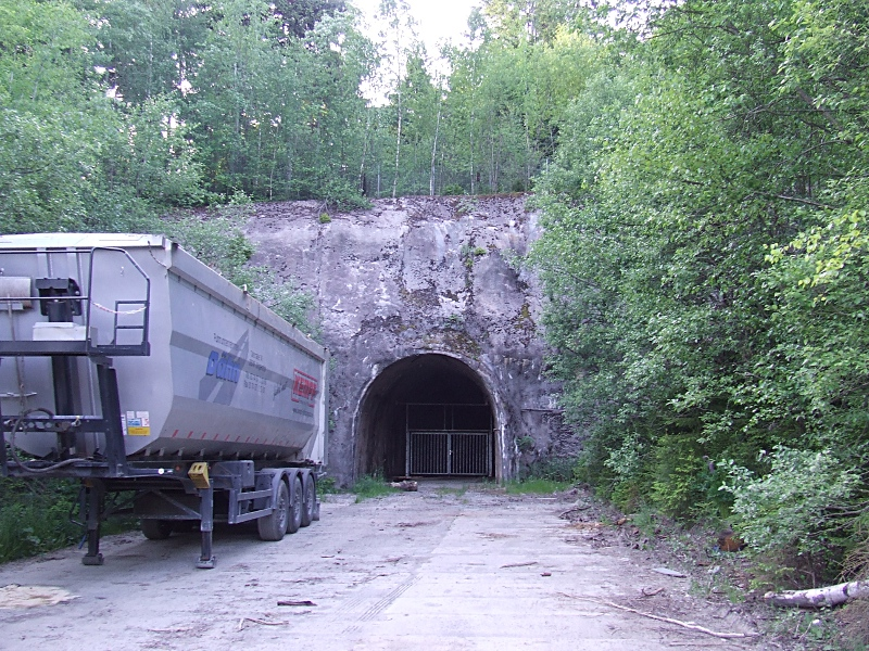 Mundloch der Rampe Brunndöbra (Schwerspatgrube Brunndöbra). Der Auflieger im Vordergrund dient nur zum Größenvergleich. Sattelfahrzeuge waren nicht für das Befahren von Rampen geeignet. Auf der Rampe Brunndöbra fuhren ausschließlich Trucks (STF, Untertagekipper-UK 1), für die zukunftige Förderung war sie vermutlich für W50/L60 und Tatra148 ausgelegt.